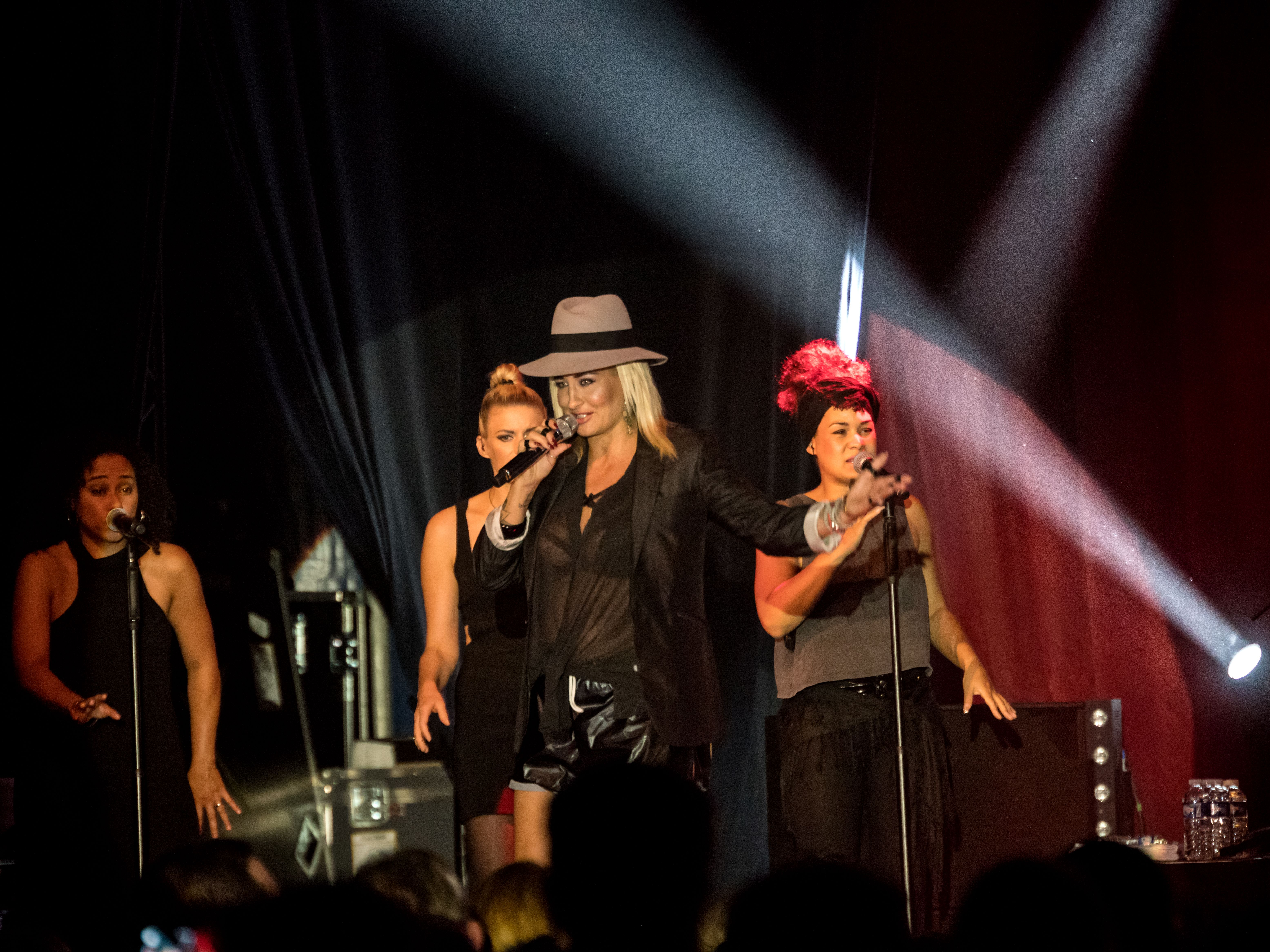 Bilder vom Zelt Musik Festival 2016 in Freiburg im Breisgau Sarah Connor